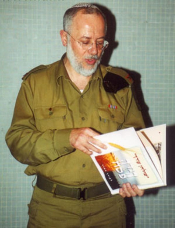 הרב הצבאי הראשי, האלוף ישראל וייס אוחז בהגדה לעורך הסדר הצה"לי אשר פורשה ולוקטה על ידו, פרי מאמץ של שנים רבות.